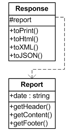 SRP пример